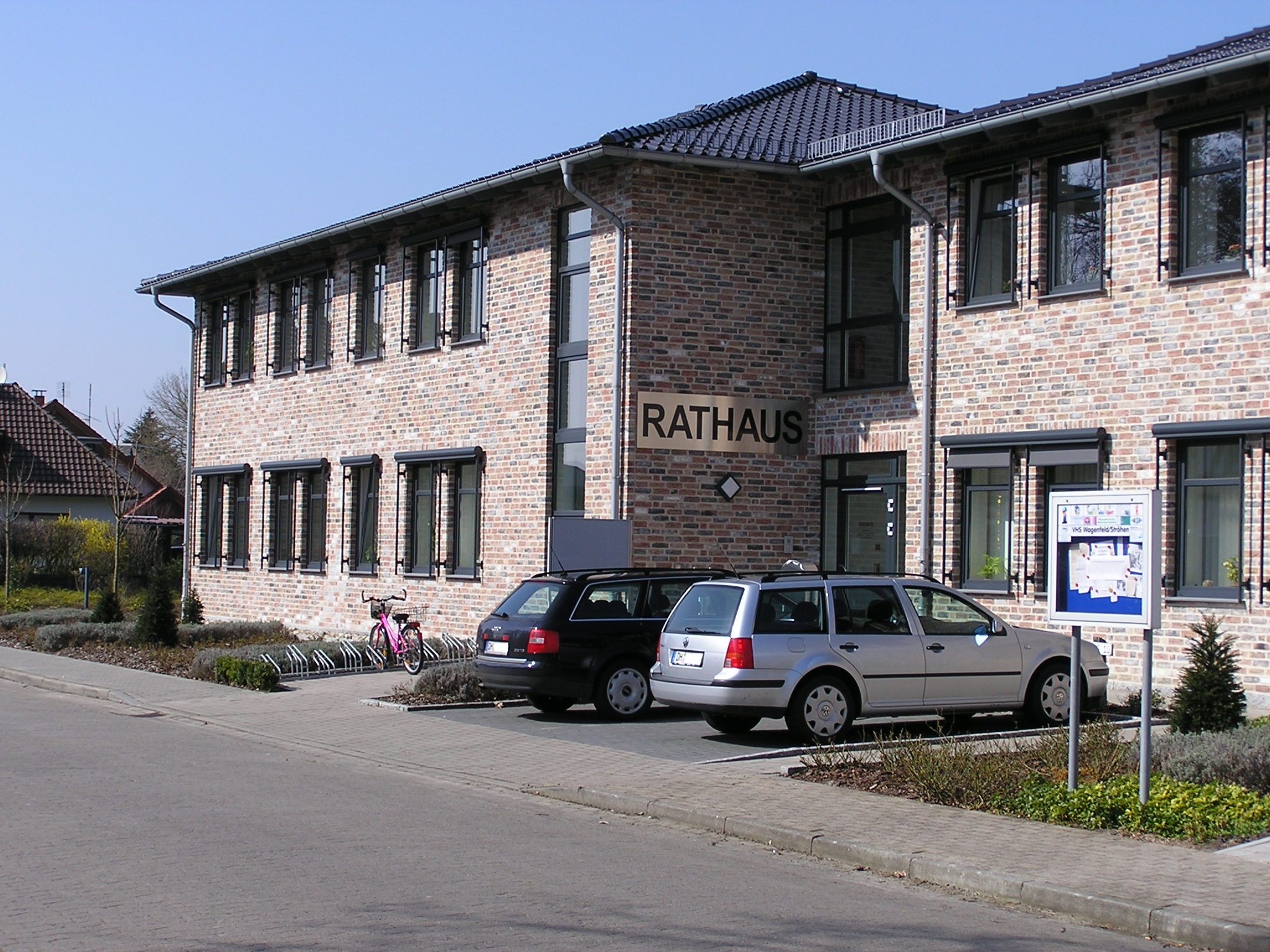 Wagenfeld neues Rathaus